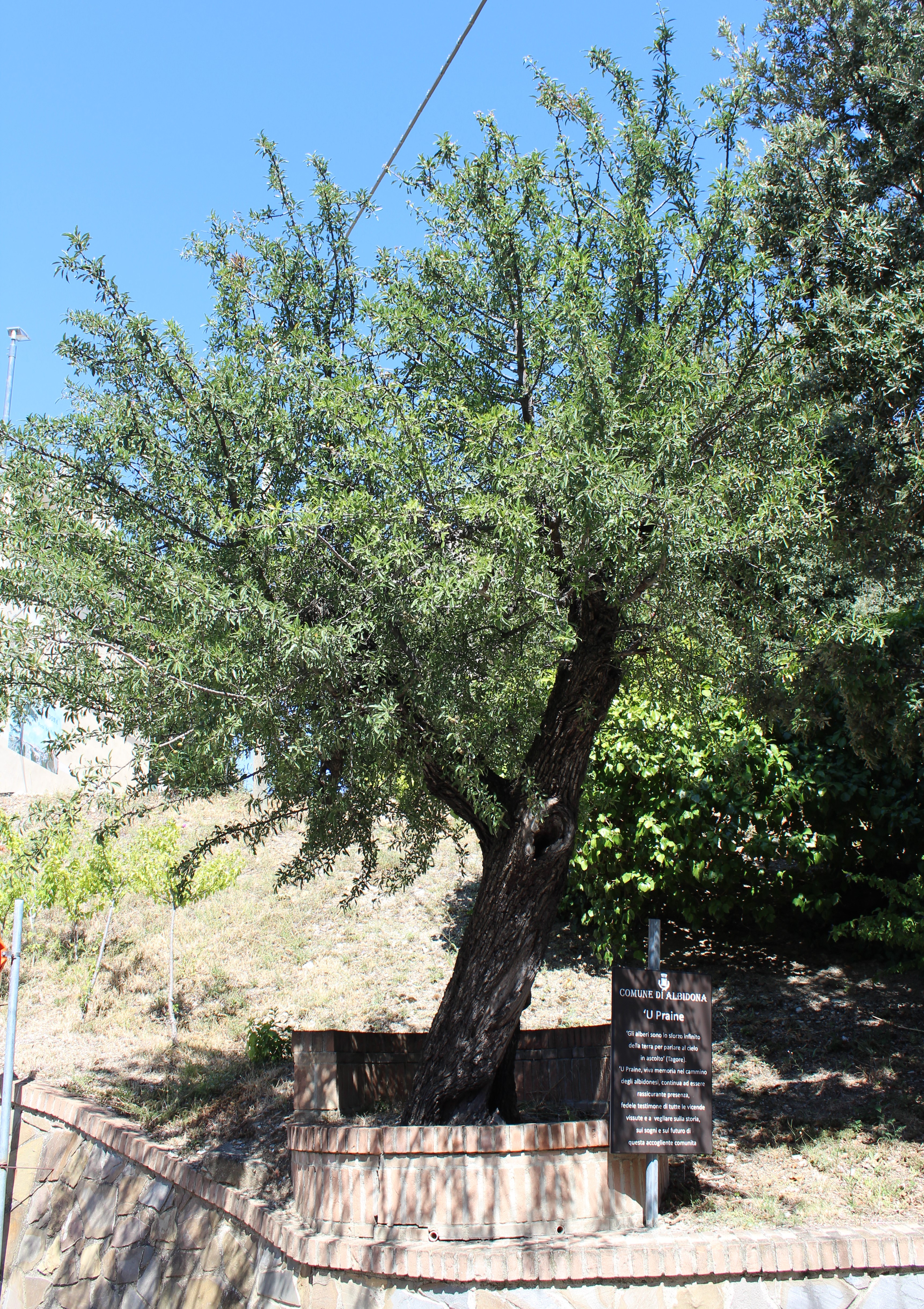 Praine i Mast Giguann